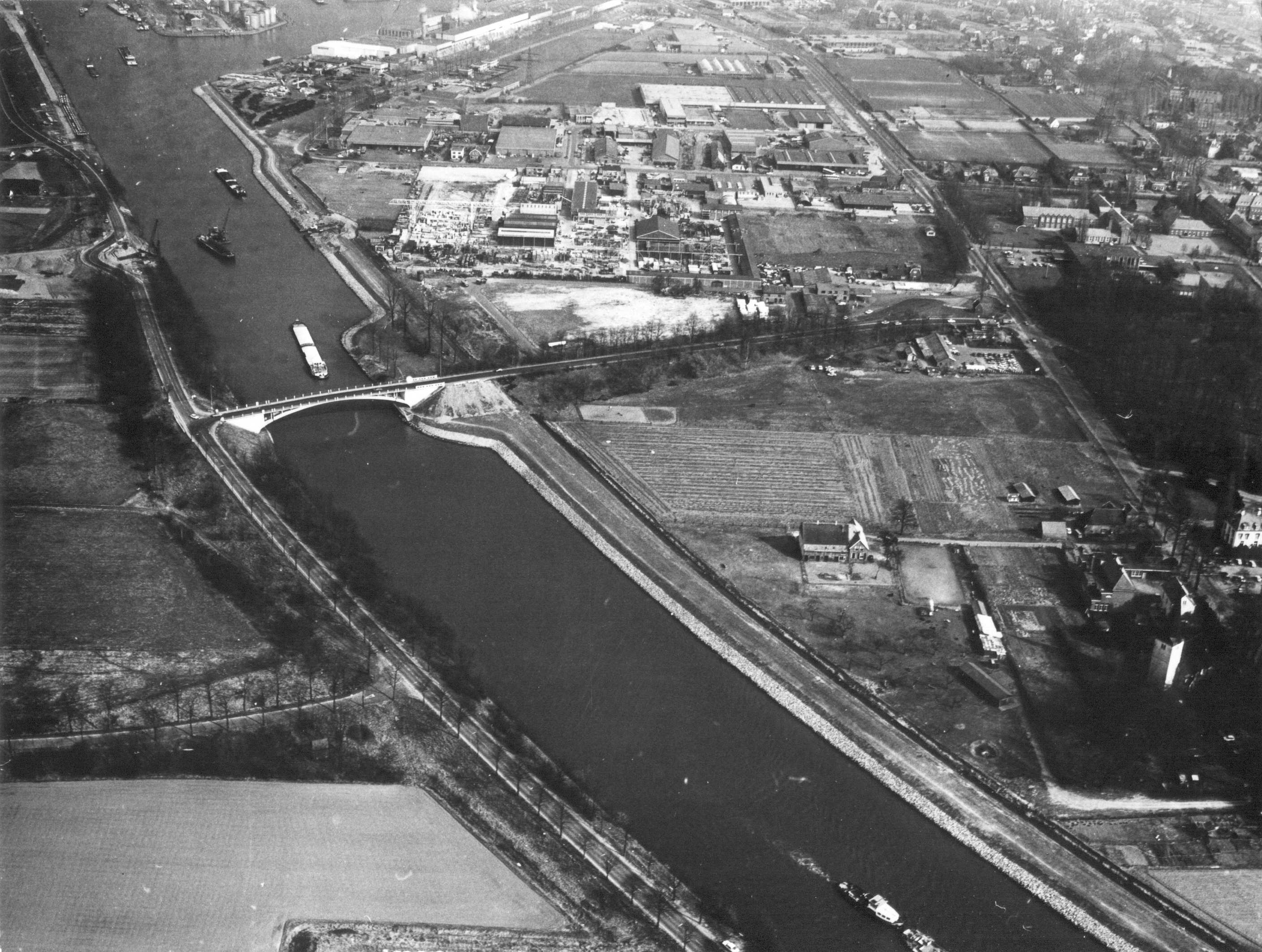 Luchtfoto van het haven-en industrieterrein, links het Maas- en Waalkanaal en een stukje Lindenholt met het oude bruggetje over het Maas en Waalkanaal. Rechts de Dorpsstraat in Neerbosch met de toren van het witte Kerkje. Rechtsboven een stukje Hees met het Dominicus-College aan de Dennenstraat